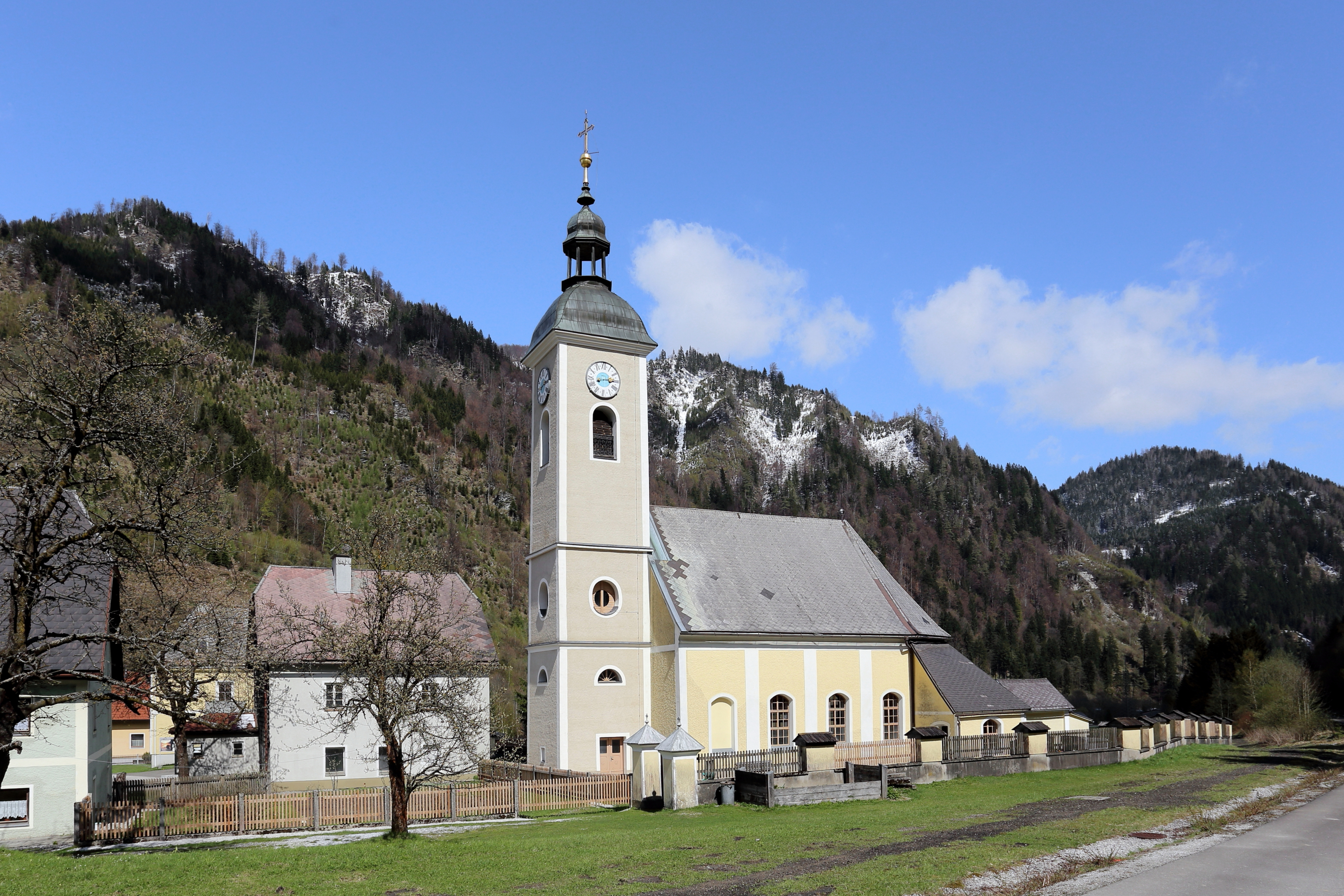 Südwestansicht der evangelischen Pfarrkirche in Unterwald, ein Ortsteil der steiermärkischen Gemeinde Wald am Schoberpaß. Das Langhaus wurde 1784 als Bethaus errichtet und der vorgestellte Turm 1849. Am 21. Juli 1850 erfolgte die Einweihung samt seinen drei Glocken.